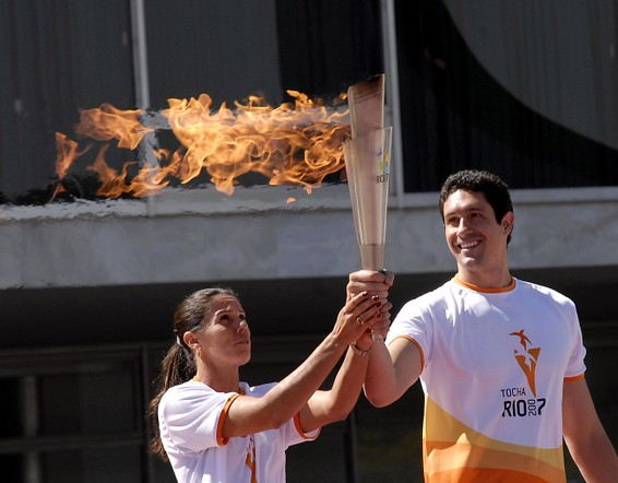 Brasília - Os atletas Sandra Pires e Gustavo Borges erguem a Tocha Pan-Americana, símbolo da paz, amizade e integração entres os povos por meio do esporte. Outros 23 atletas da cidade carregarão a tocha em um percurso que inclui os principais pontos de Brasília e da cidade-satélite de Taguatinga